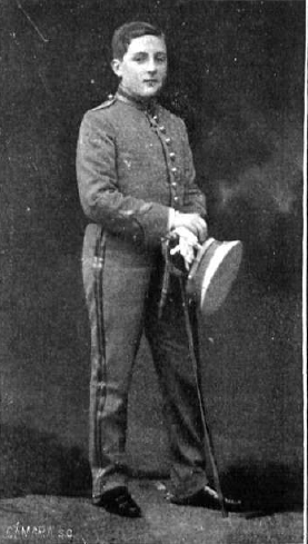 Fotografía del infante Alfonso de Borbón con uniforme de húsares publicada en marzo de 1912.